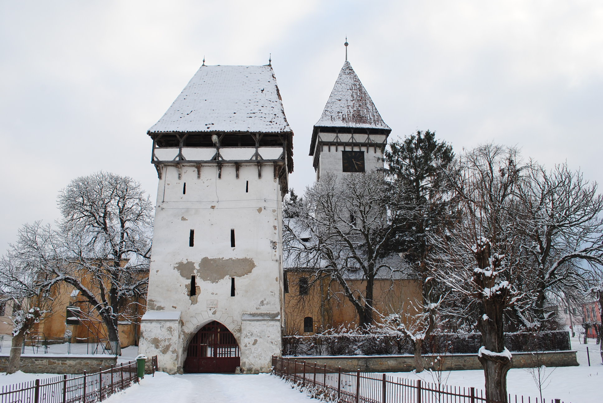 Ansamblul bisericii evanghelice fortificate Agnita, a doua jum. a sec. XIII - sec. XIX